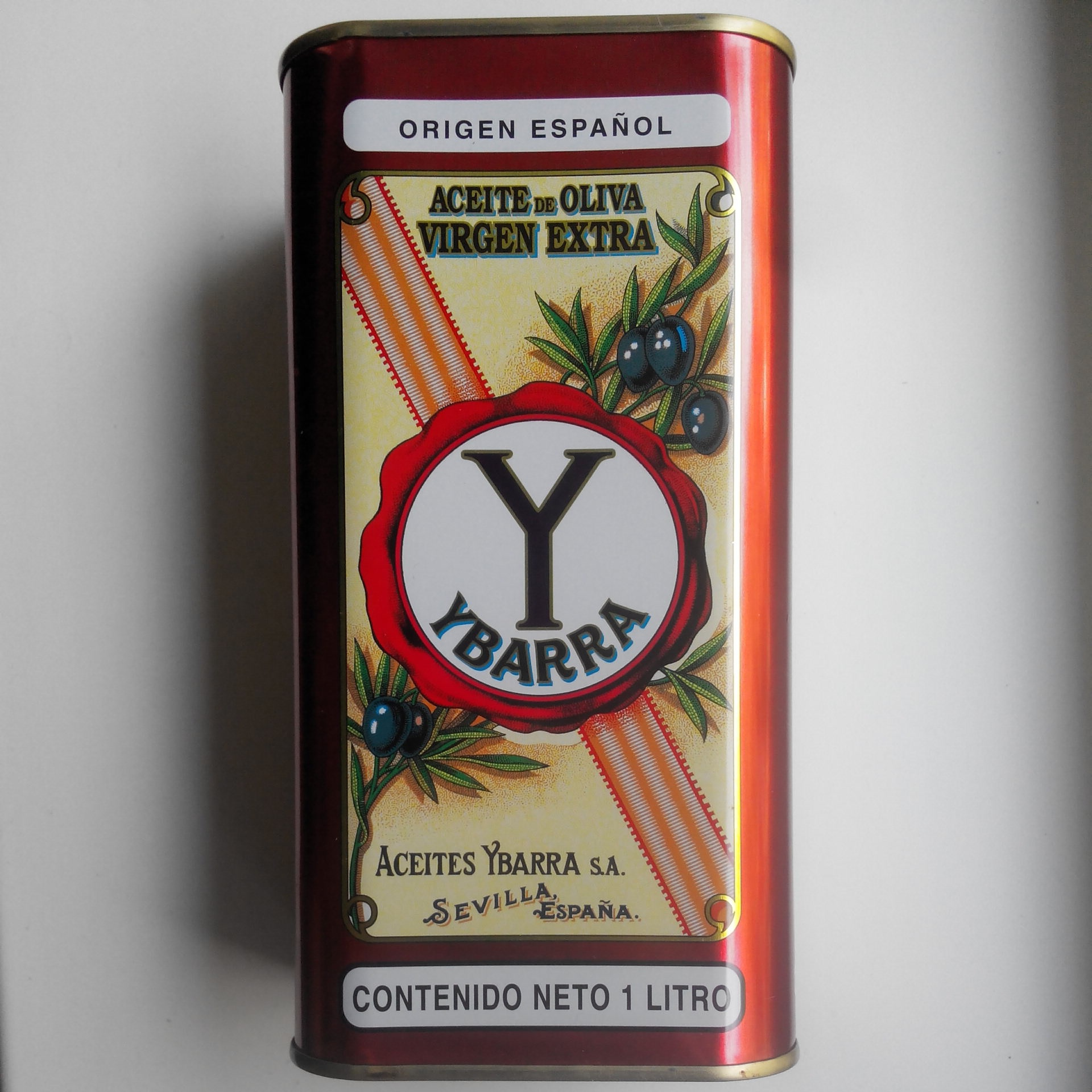 Оливкова олія екстра-класу Virgen Extra